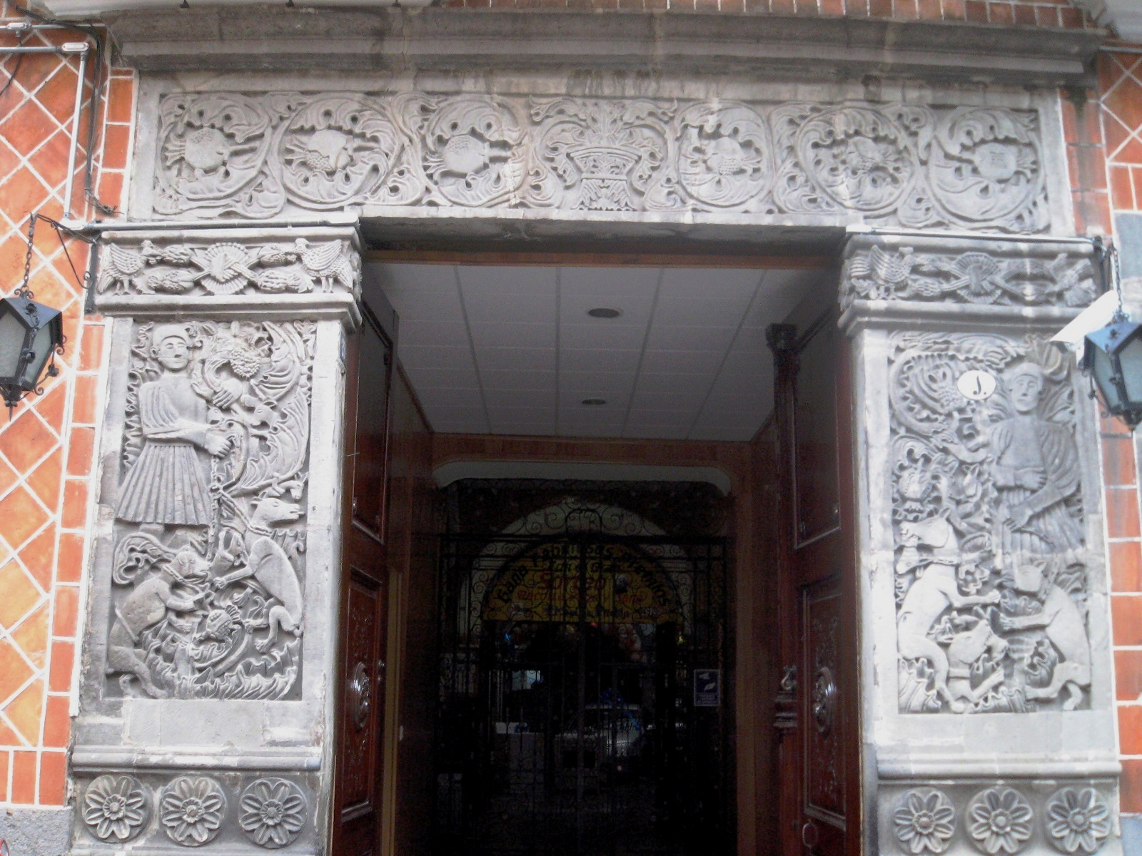 Portada Renacentista de la Casa del que mato al animal